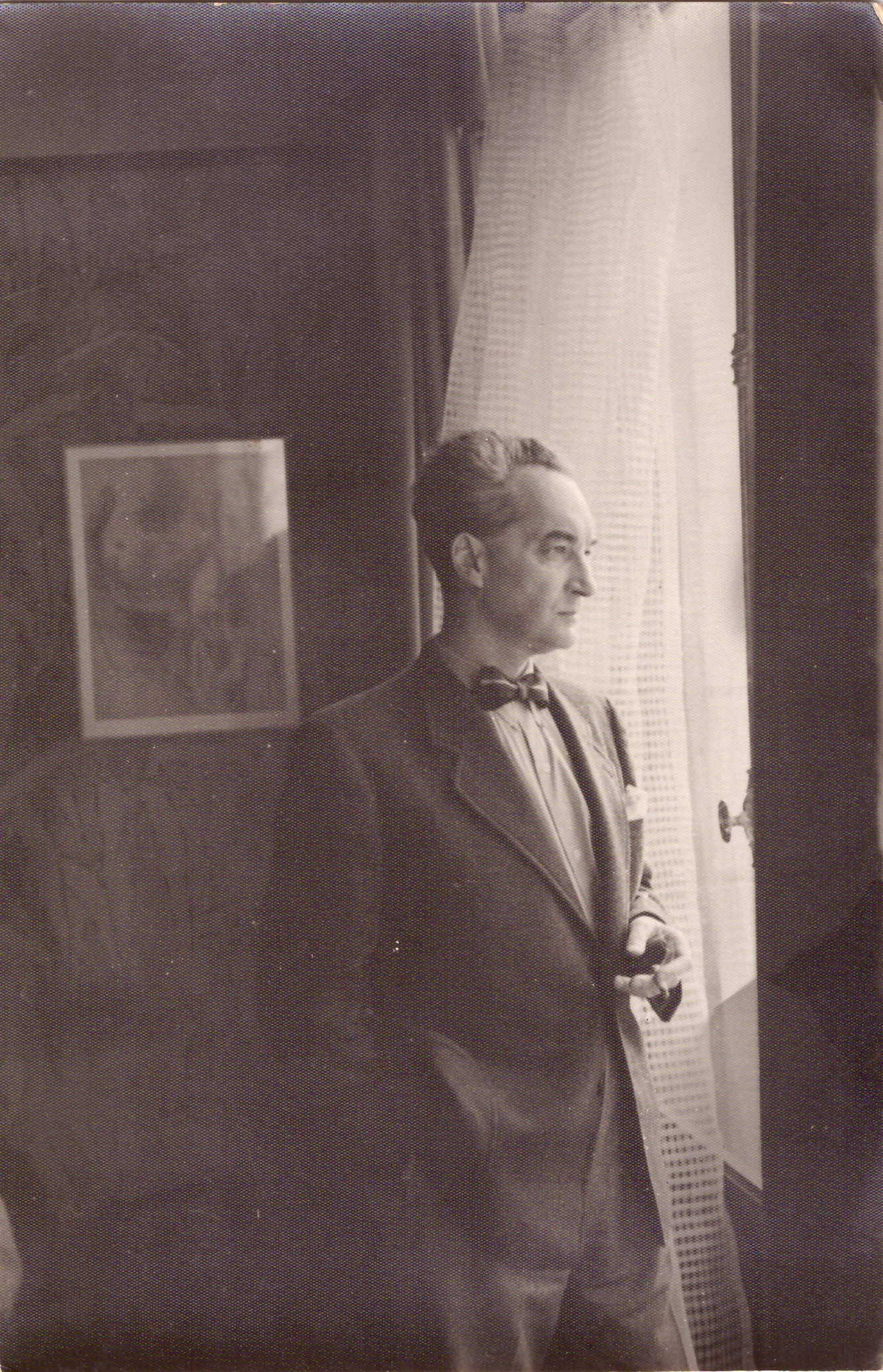 Portrait de Jacques Spitz